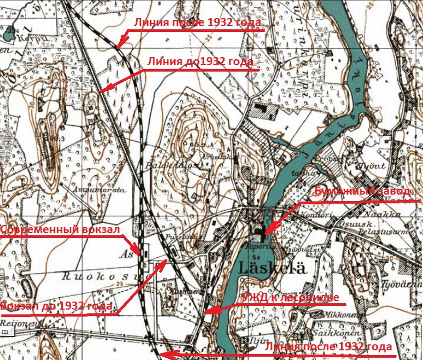 Схема Ляскеля